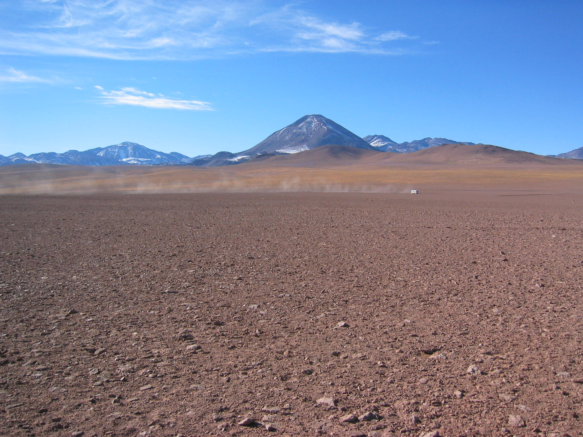 Putana and Cerro Colorado volcanoes.